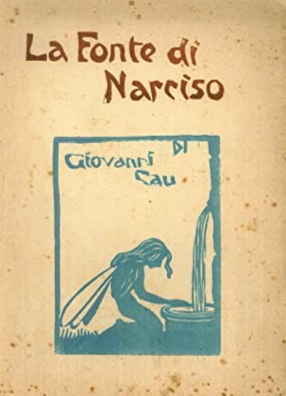 Avfotograferat bokomslag till La fonte di Narciso 1927, med text av Giovanni Cau och illustrationer av Helga Elmqvist-Cau